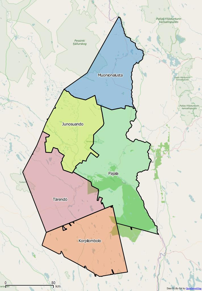 Distriktsindelningen i Pajala kommun World file: 474.52666118751233171 0 0 -474.52666118751233171 2394160.24655688973143697 10520618.81257925555109978